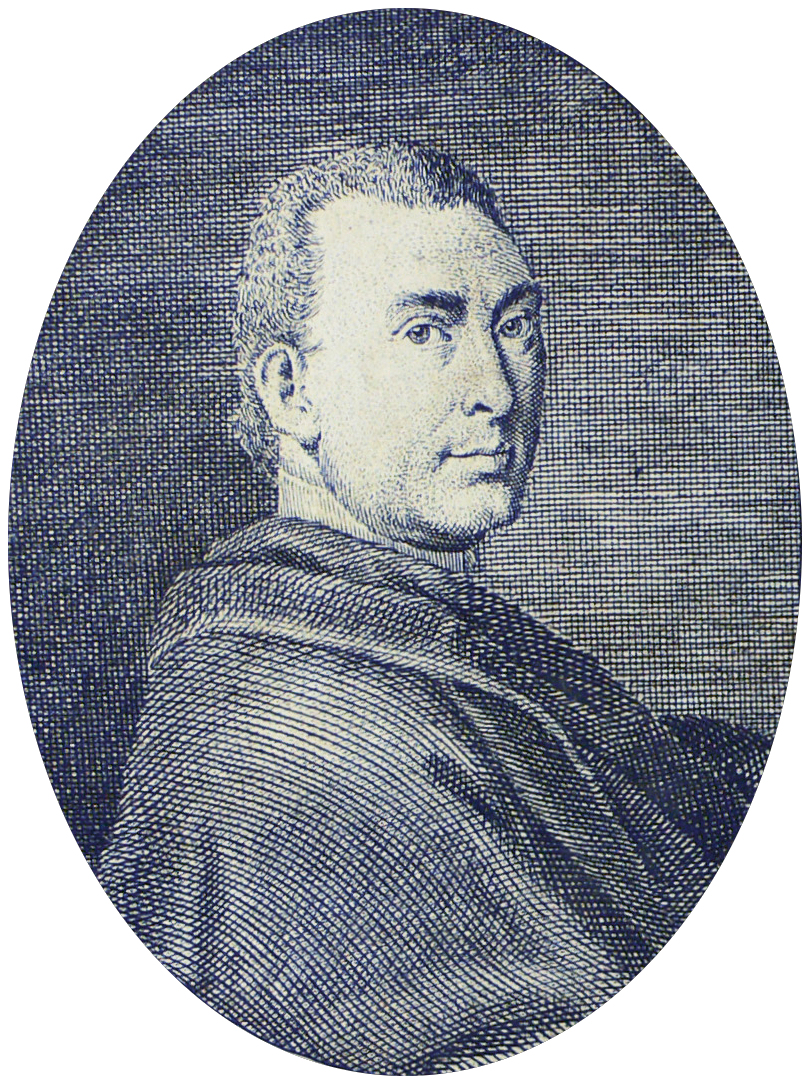 Delle conquiste celebri esaminate col naturale diritto delle genti. Libri due di Agatopisto Cromaziano ... In Lucca : per Giovanni Riccomini, 1763. XV, [1], 302, [2] p., [1] c. di tav. : ritr. ; 8°